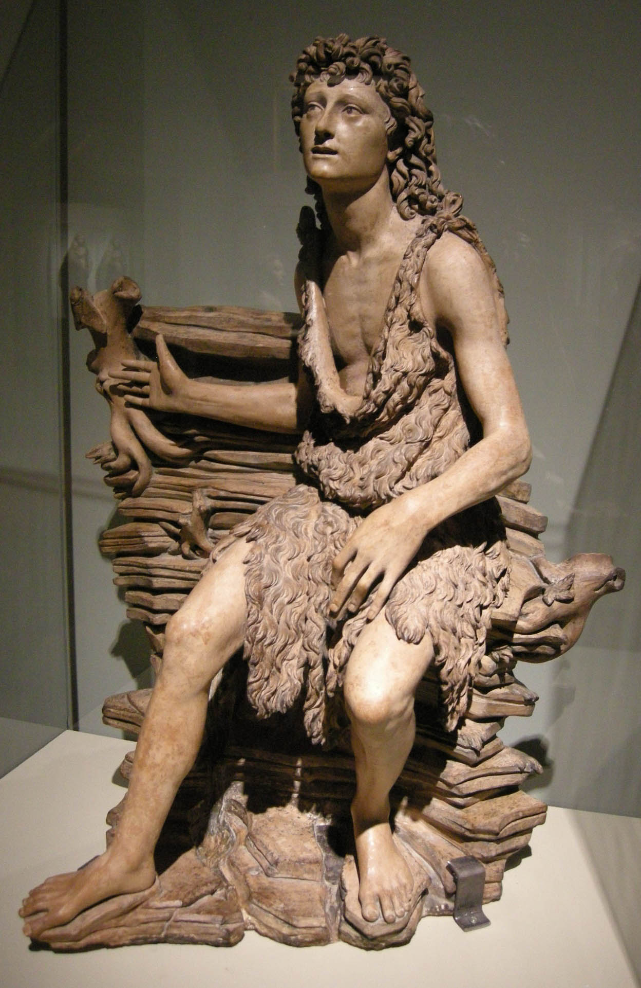 Maestro del san giovannino, san giovannino nel deserto, 1505-1507 circa